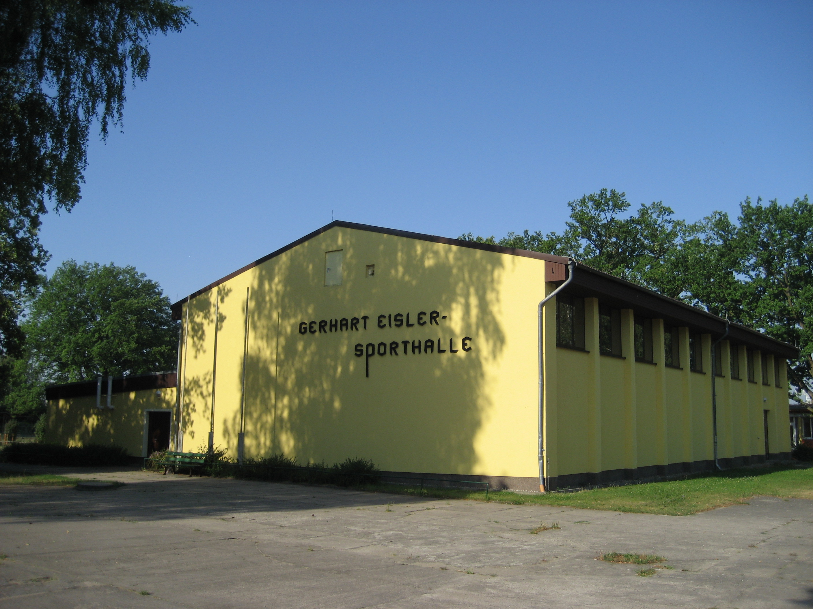 Die Gerhart-Eisler-Sporthalle auf dem Gelände des Schulkomplexes in Löcknitz (Nordostseite).